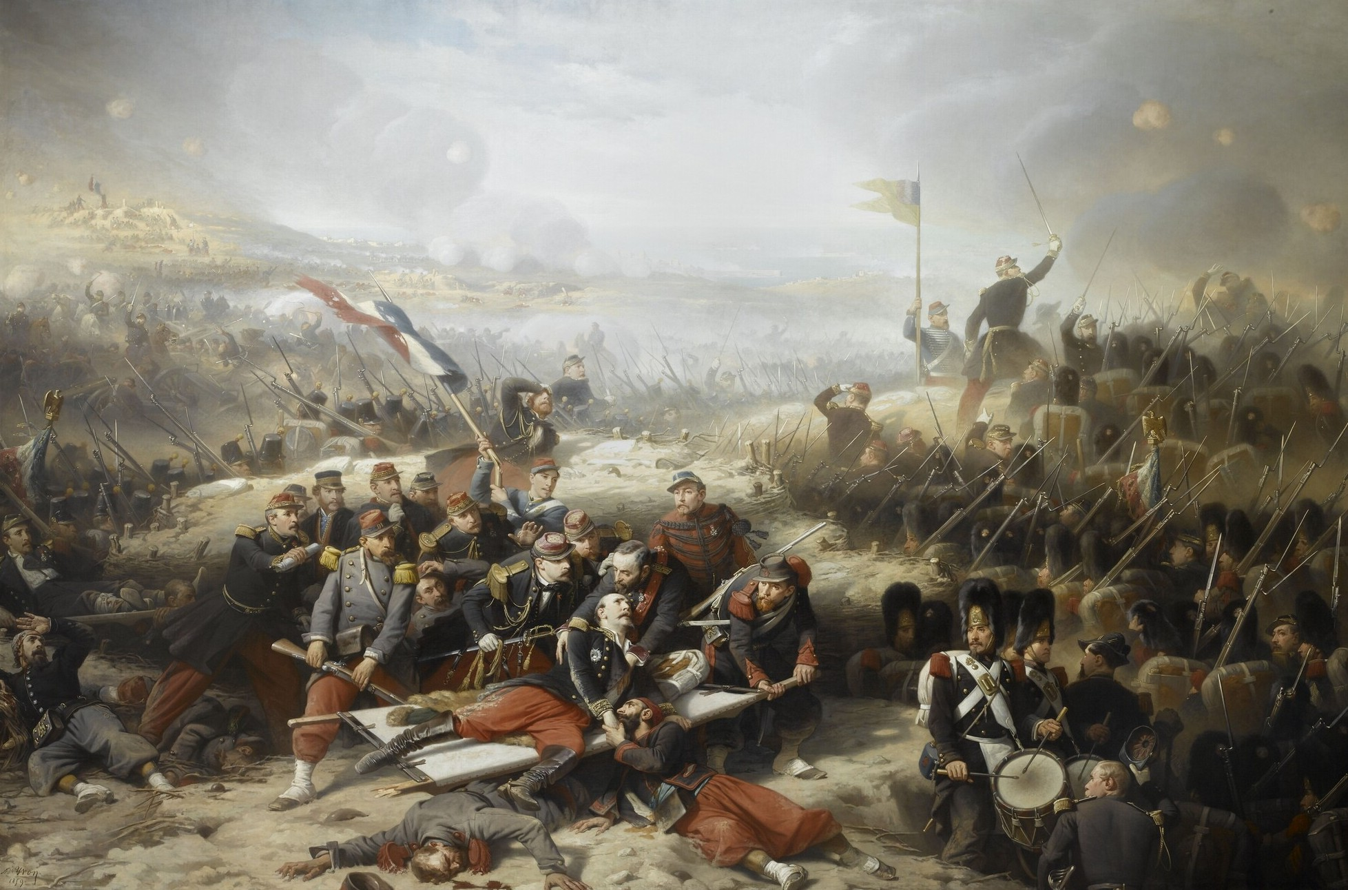 La Courtine de Malakoff, 8 septembre 1855. Bataille de Malakoff. Au premier plan : le général Bosquet blessé lors de l'assaut. Guerre de Crimée (1853-1856). Dimensions : 498 x 750 cm. Matière et technique : huile sur toile.